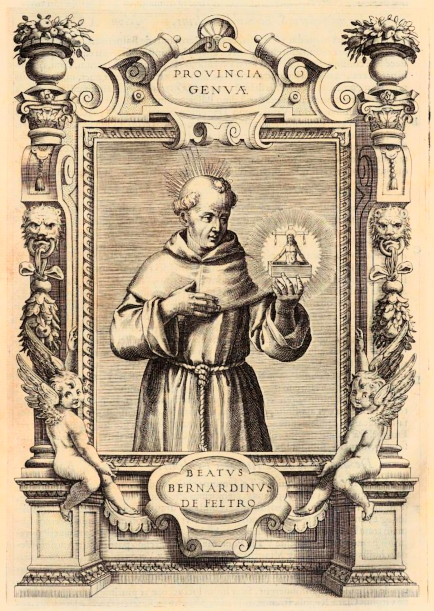 Bernardin de Feltre par Gonzaga, Francesco